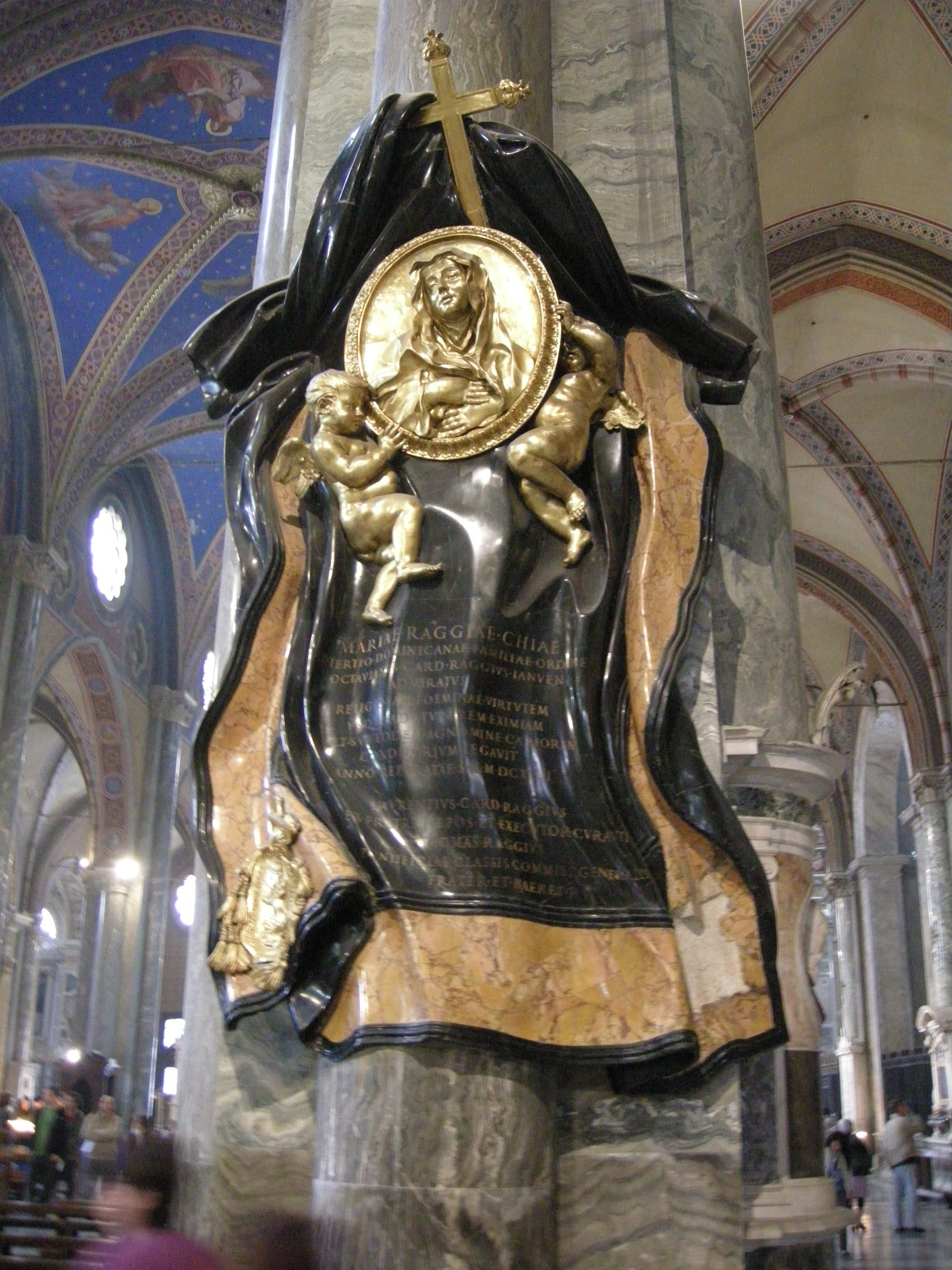 Gian lorenzo bernini, Cenotafio di Suor Maria Raggi (1647-53)